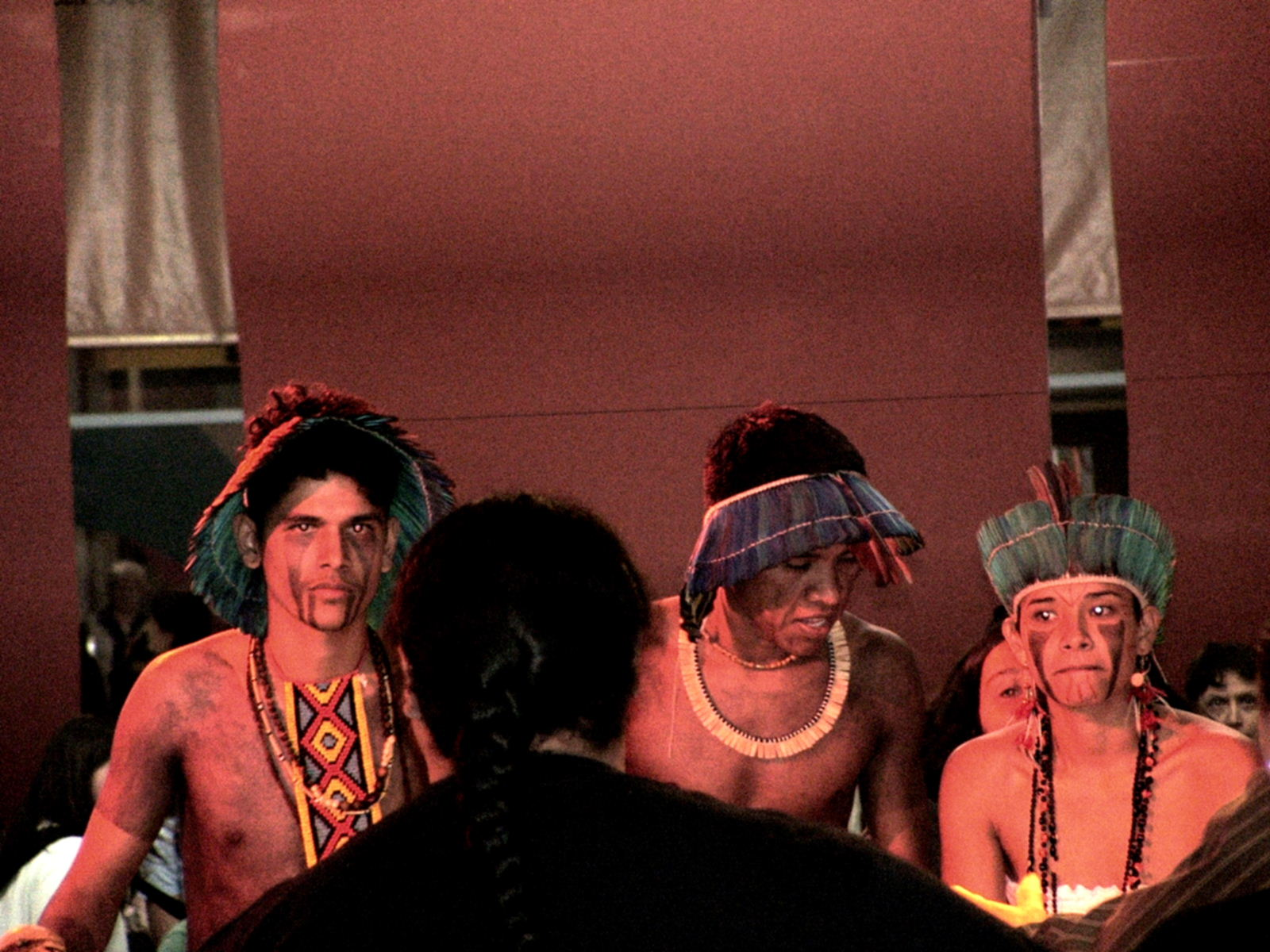 Torino Fiera internazionale del libro 2006, stand Lingua Madre, gruppo musicale neozelandese Haka The Legend, che ha presentato un repertorio di canti e balli maori (inclusa la famosa danza di guerra)- Photo does not depict Māori - the people in the photo are probably from South America. Kahuroa 05:45, 25 September 2006 (UTC)